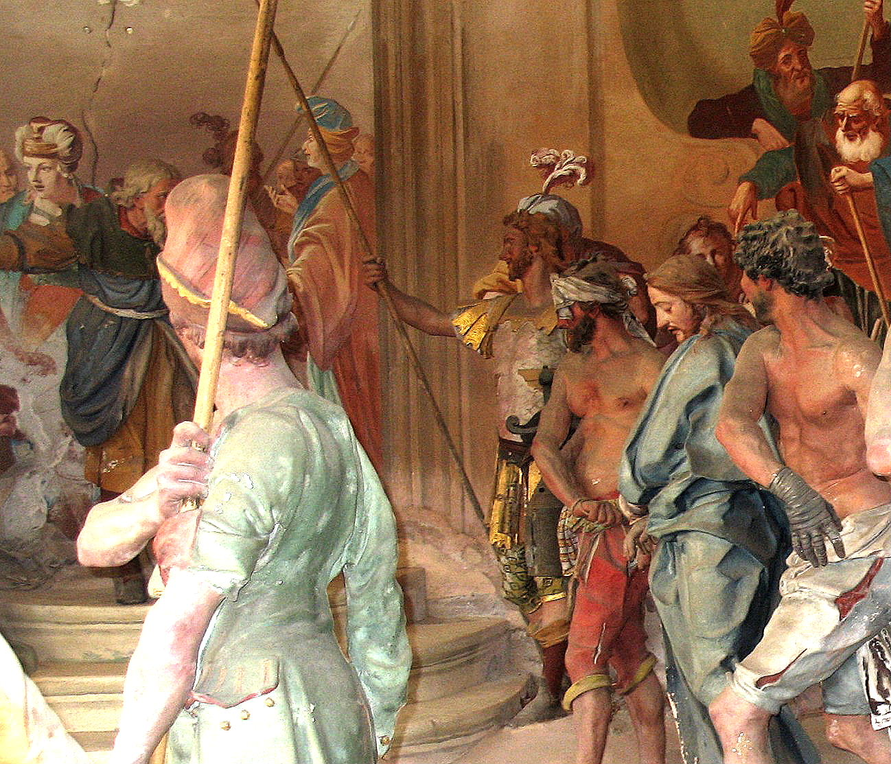 Gesù al tribunale di Anna. Statue di Carlo Antonio Tantardini (1742-1743) e Giovanni Battista Berneto (1776). fresco: Sigismondo Betti (1765).